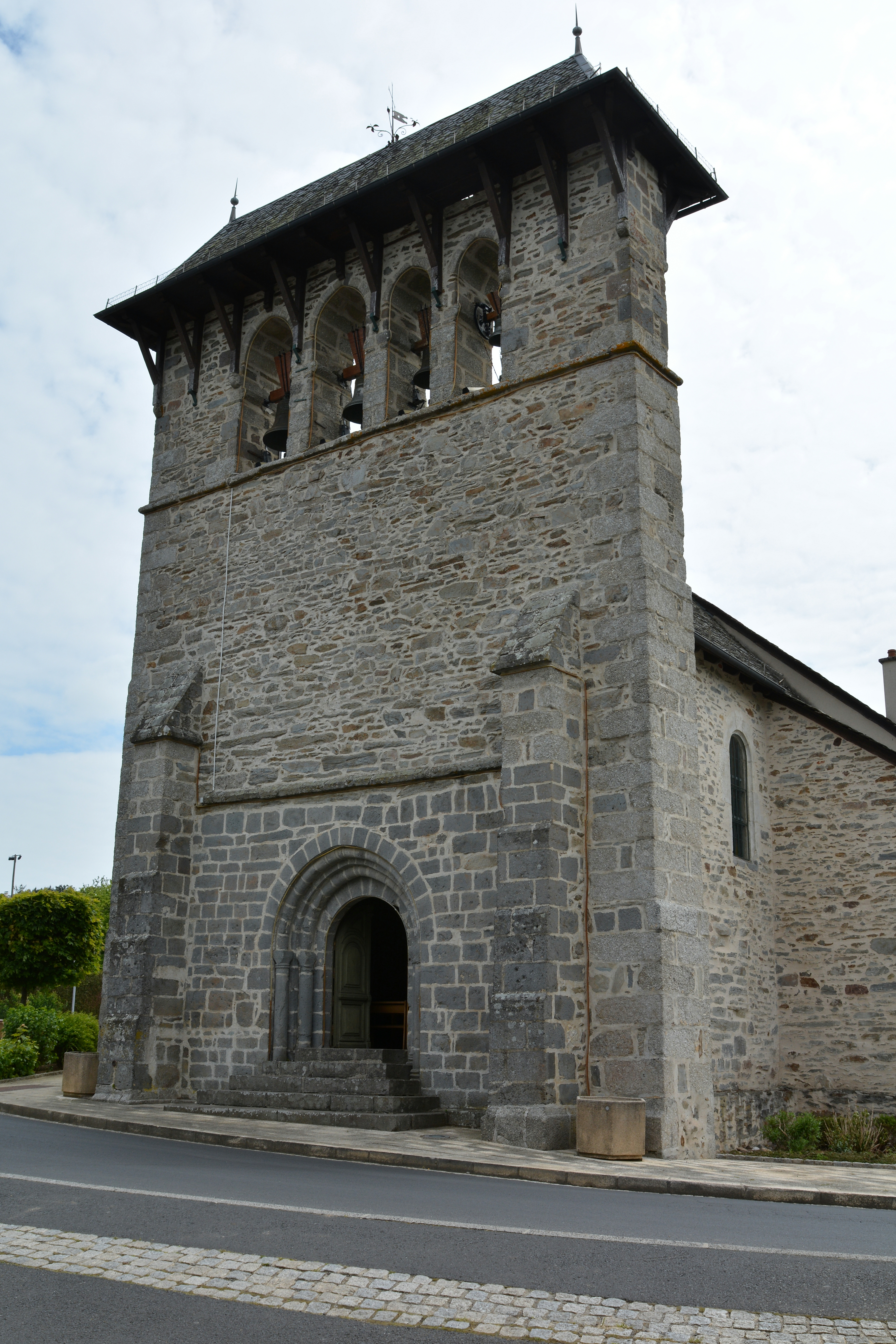 Eglise de Roannes-Saint-Mary